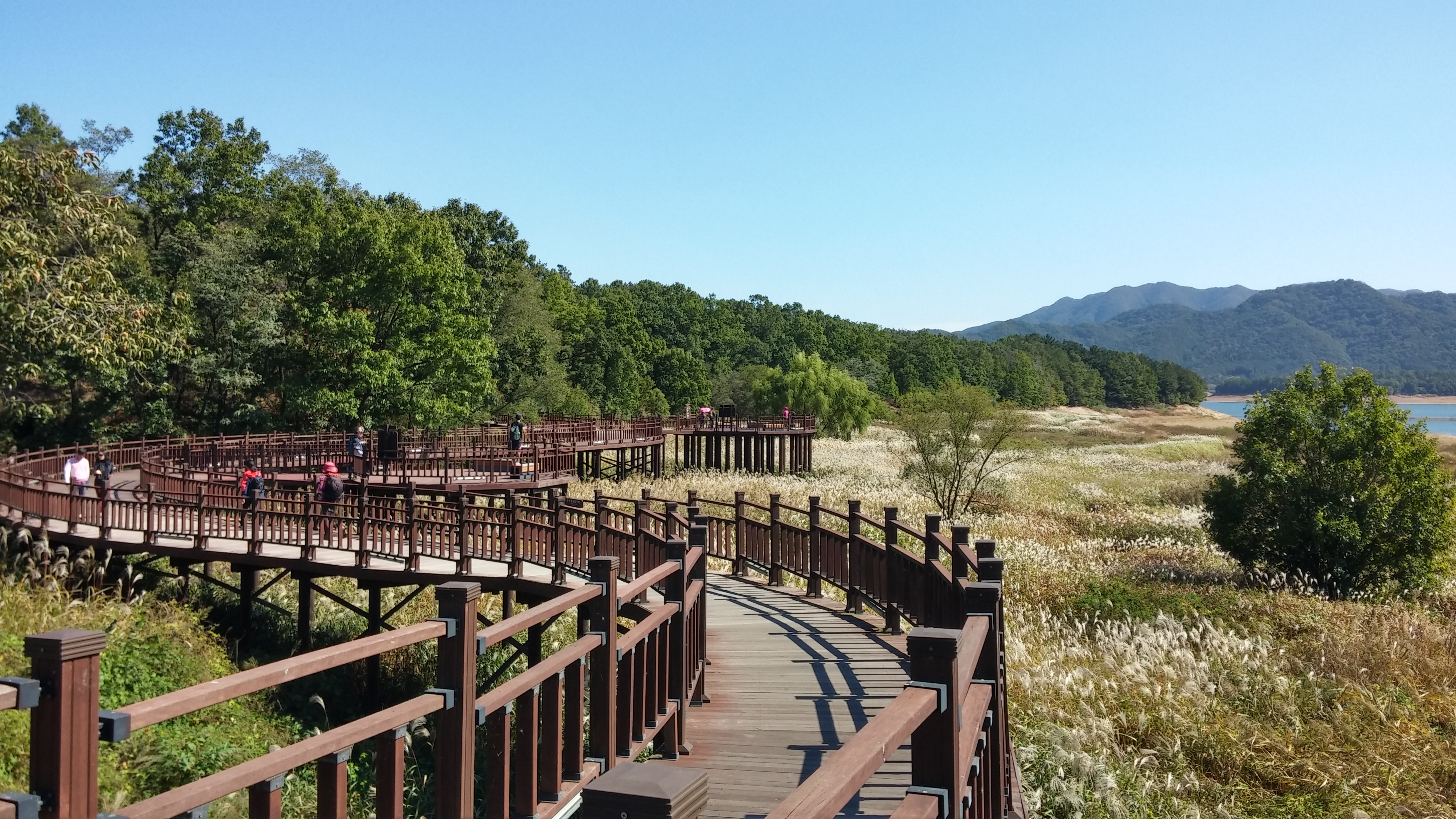 대청호오백리길 4구간_6